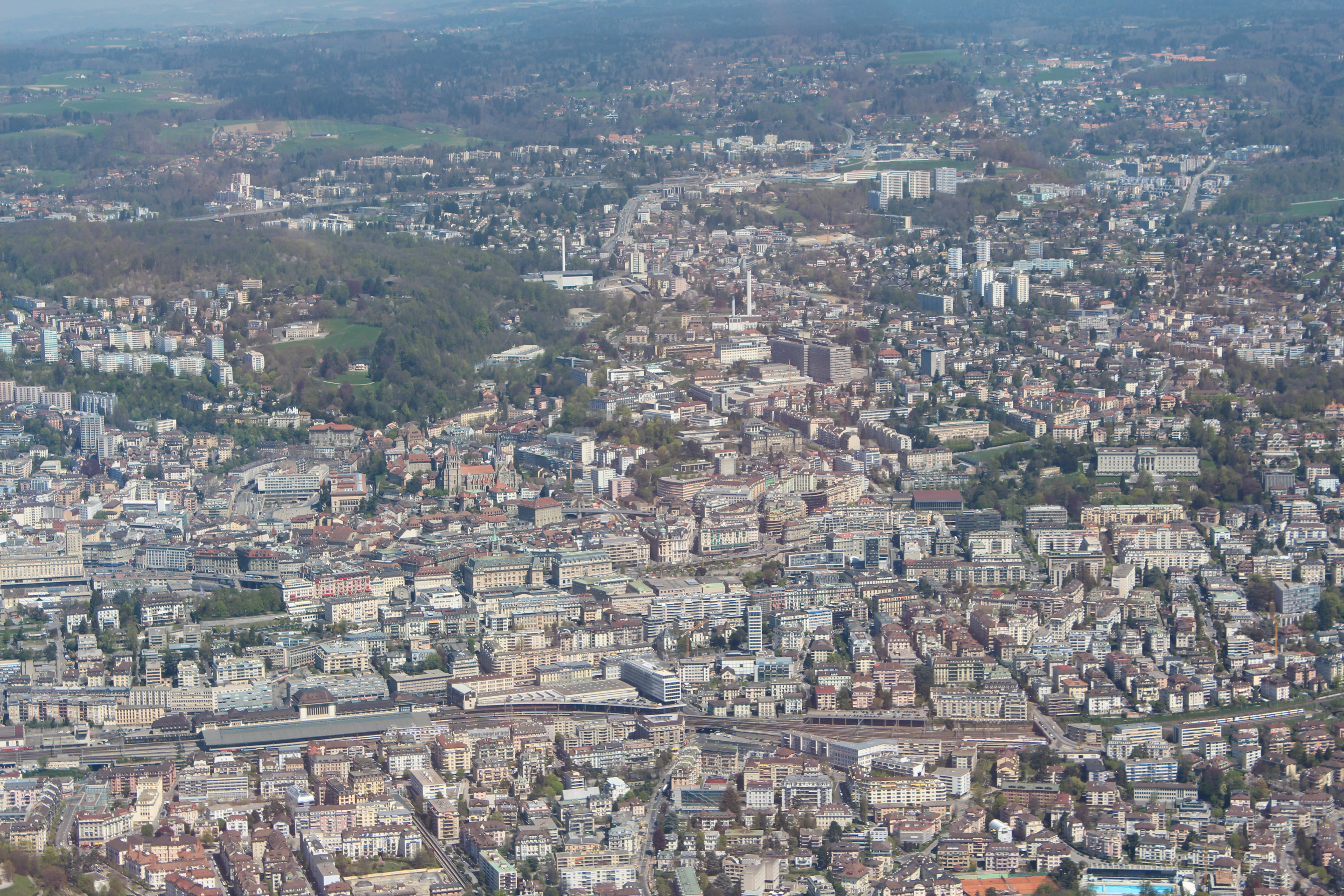 Vue aérienne de Lausanne